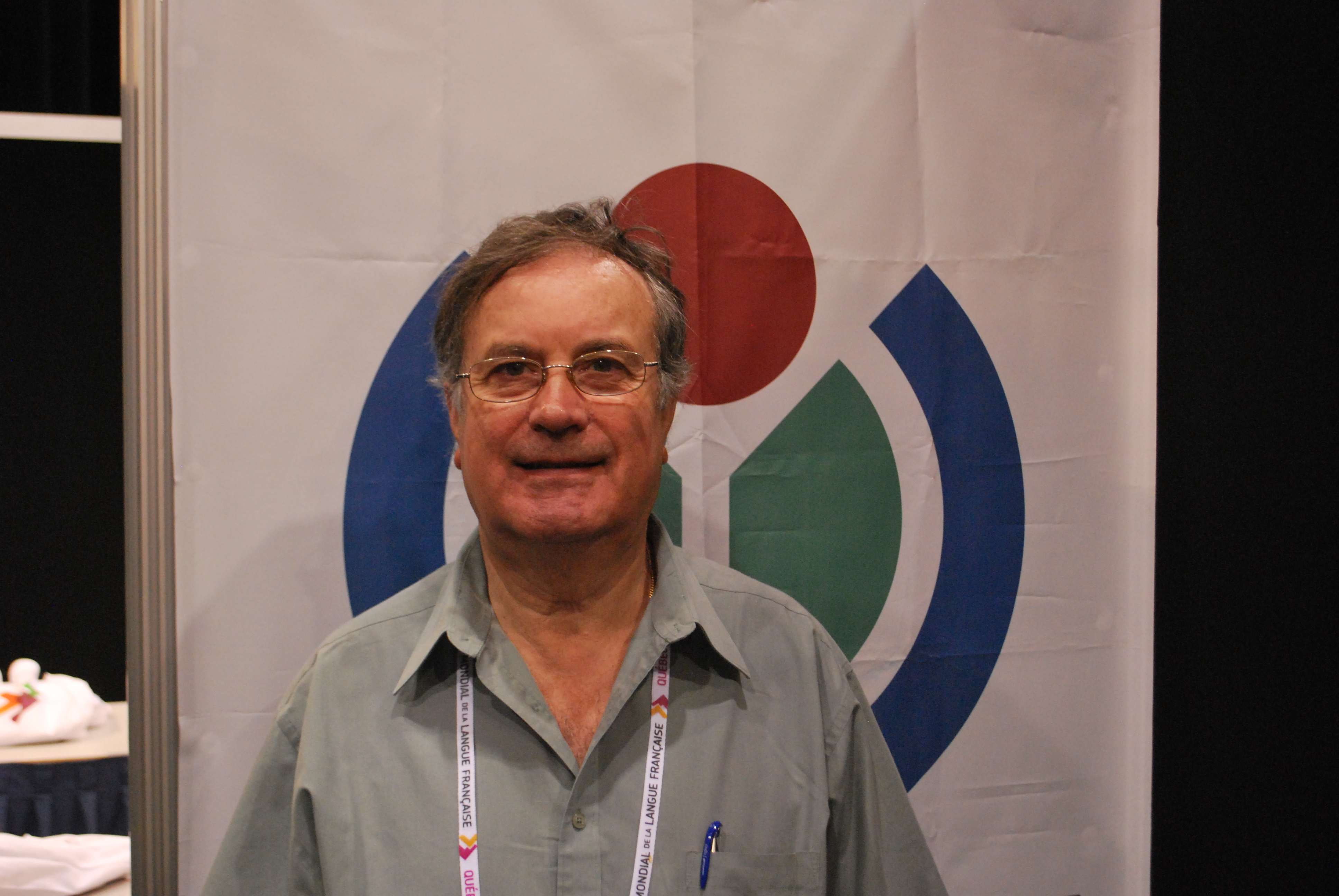 Jules Custodio, président de la Fédération des francophones de Terre-Neuve-et-Labrador.